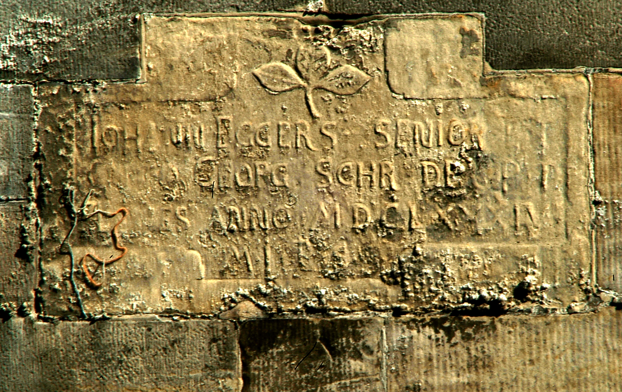 Direkt unterhalb der ehemaligen Sommerbrücke in Hannover in die gemauerte Uferbefestigung der "Rademachertreppe bewußt eingelassene Stein mit der Inschrift "Johann Eggers Senior / Georg Schrader [?] Fides [?] Anno MDCLXXXIV ...".